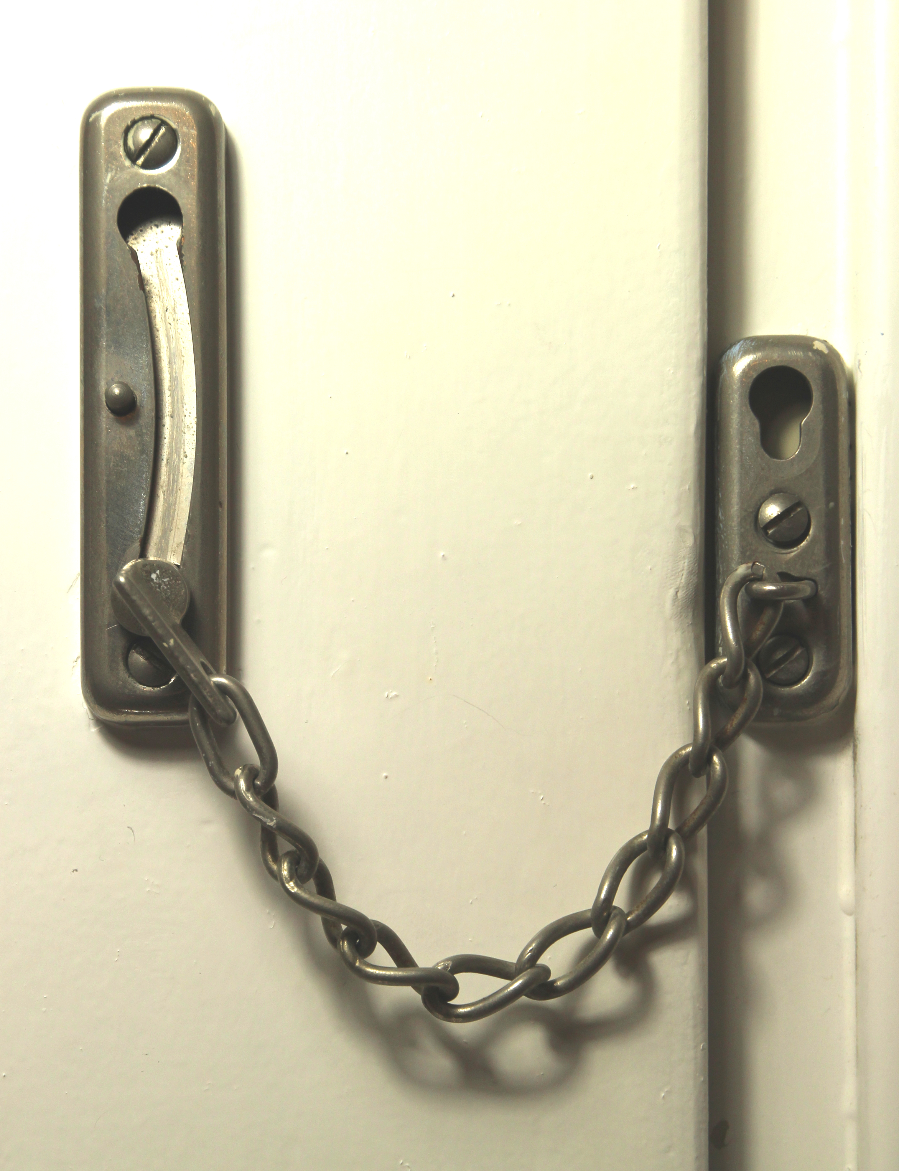 Bildinhalt: Eingehängte Türkette an weißer Tür Aufnahmeort: Baden-Baden, Deutschland